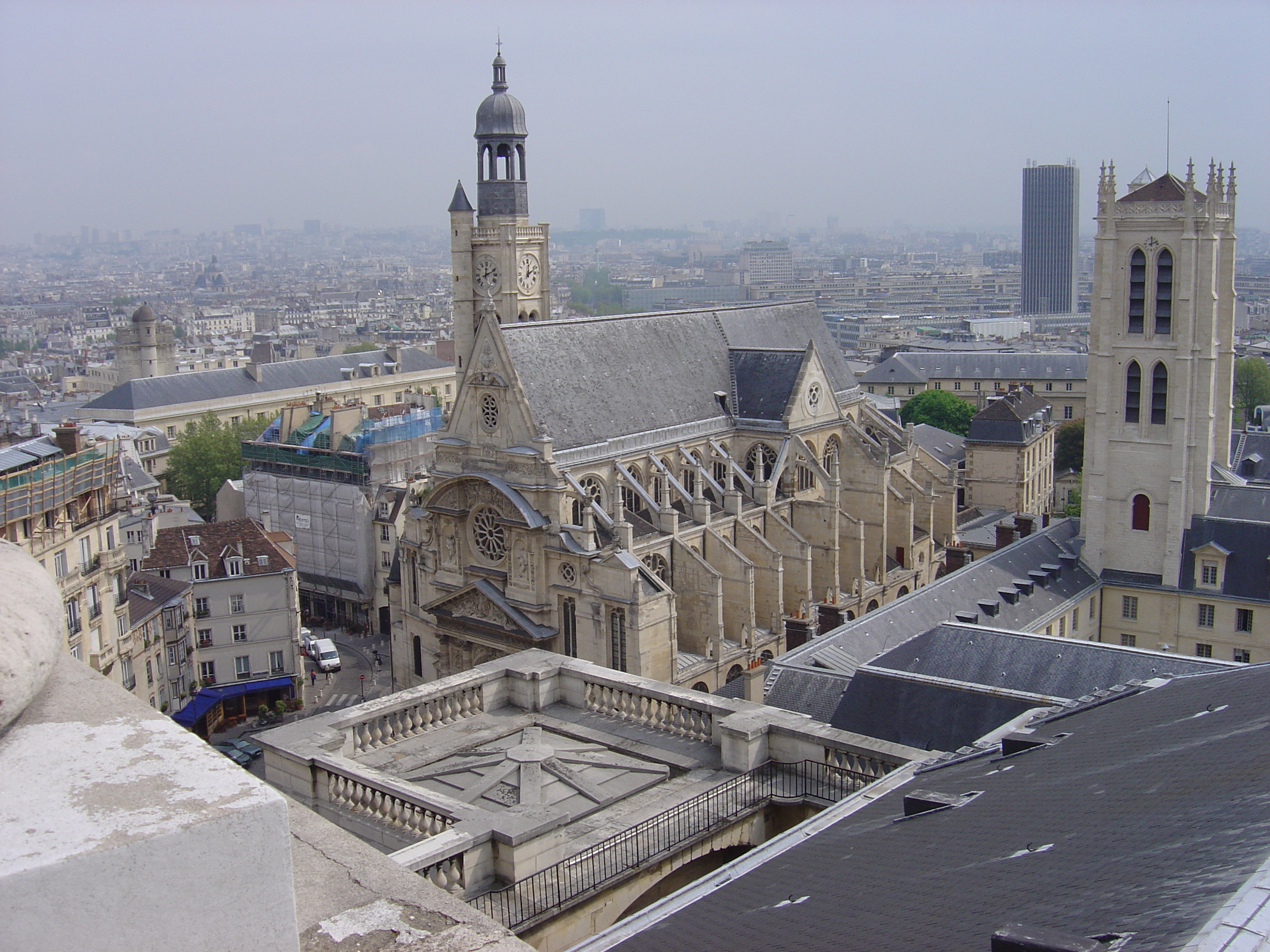 L'église Saint-Etienne-du-Mont vue depuis le Panthéon.